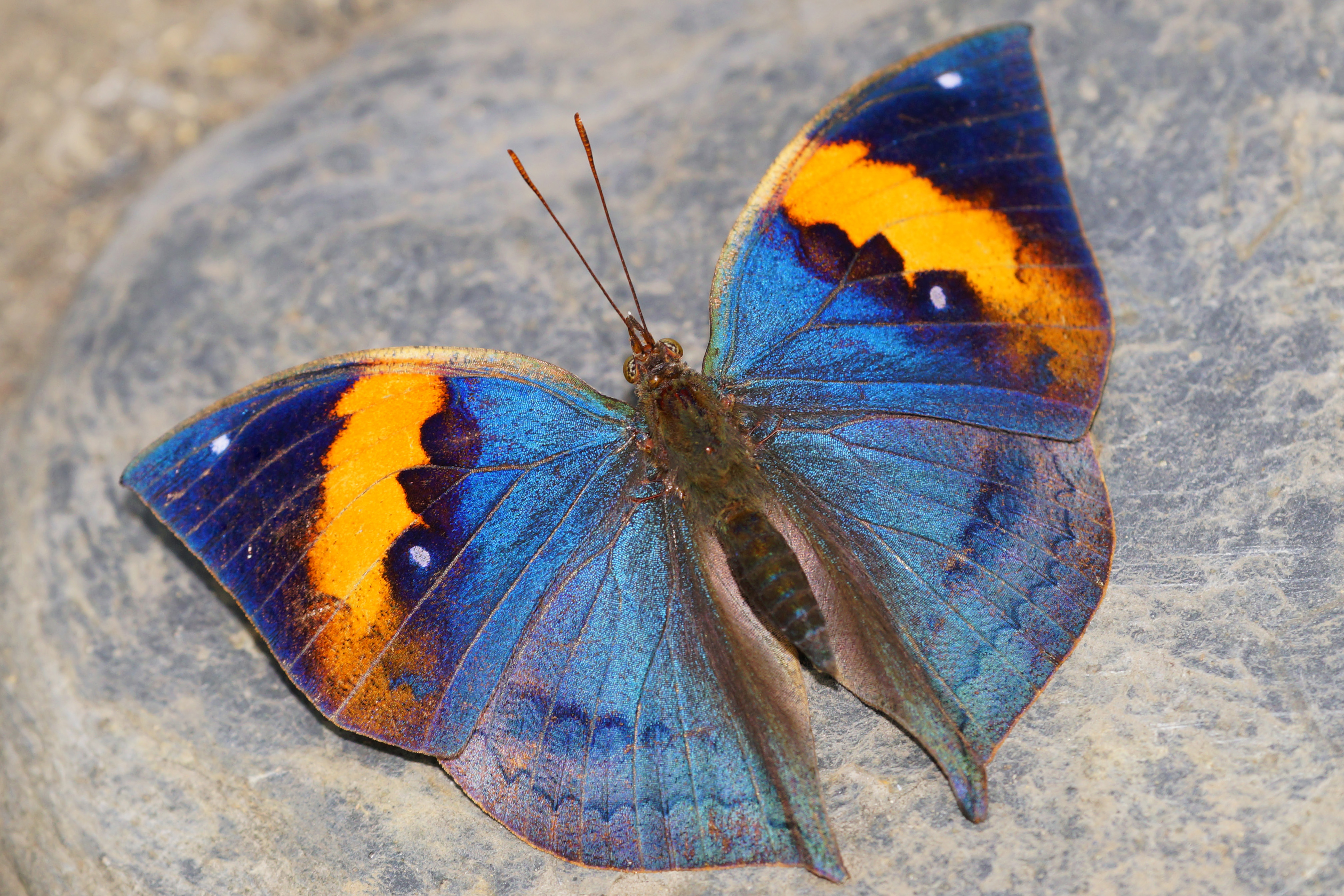 枯葉蝶 Kallima inachus formosana